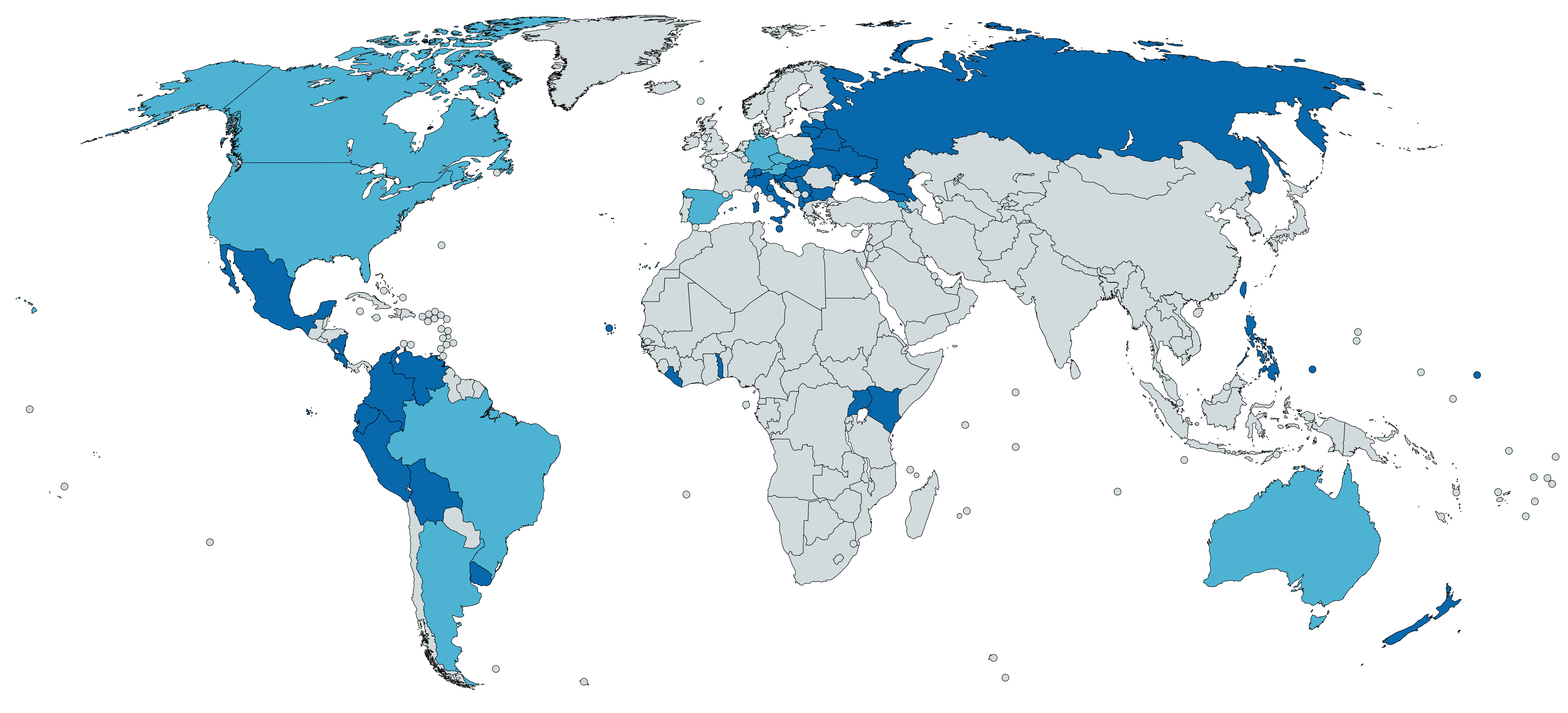 Créé avec selon les informations de et des pages Wikipédia dédiées aux référendums dans les pays concernés Référendums d'origine populaire : Possibles à l'échelon national Possibles à l'échelon infranational uniquement